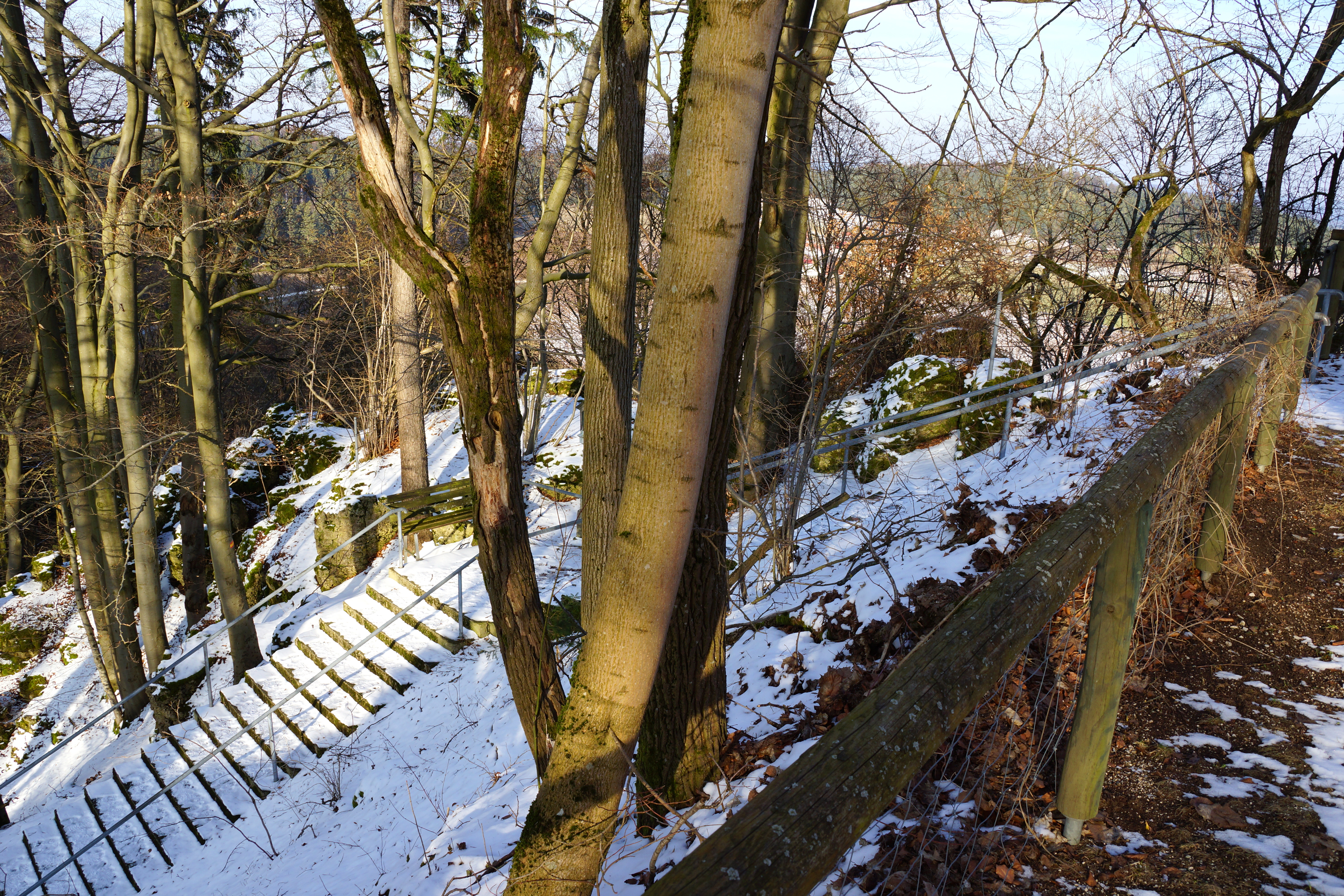 Der Habsberg östlich von Neumarkt